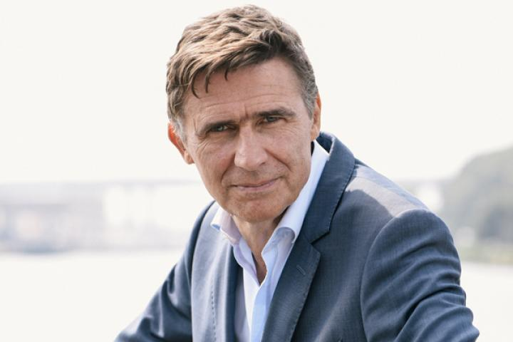 Erik